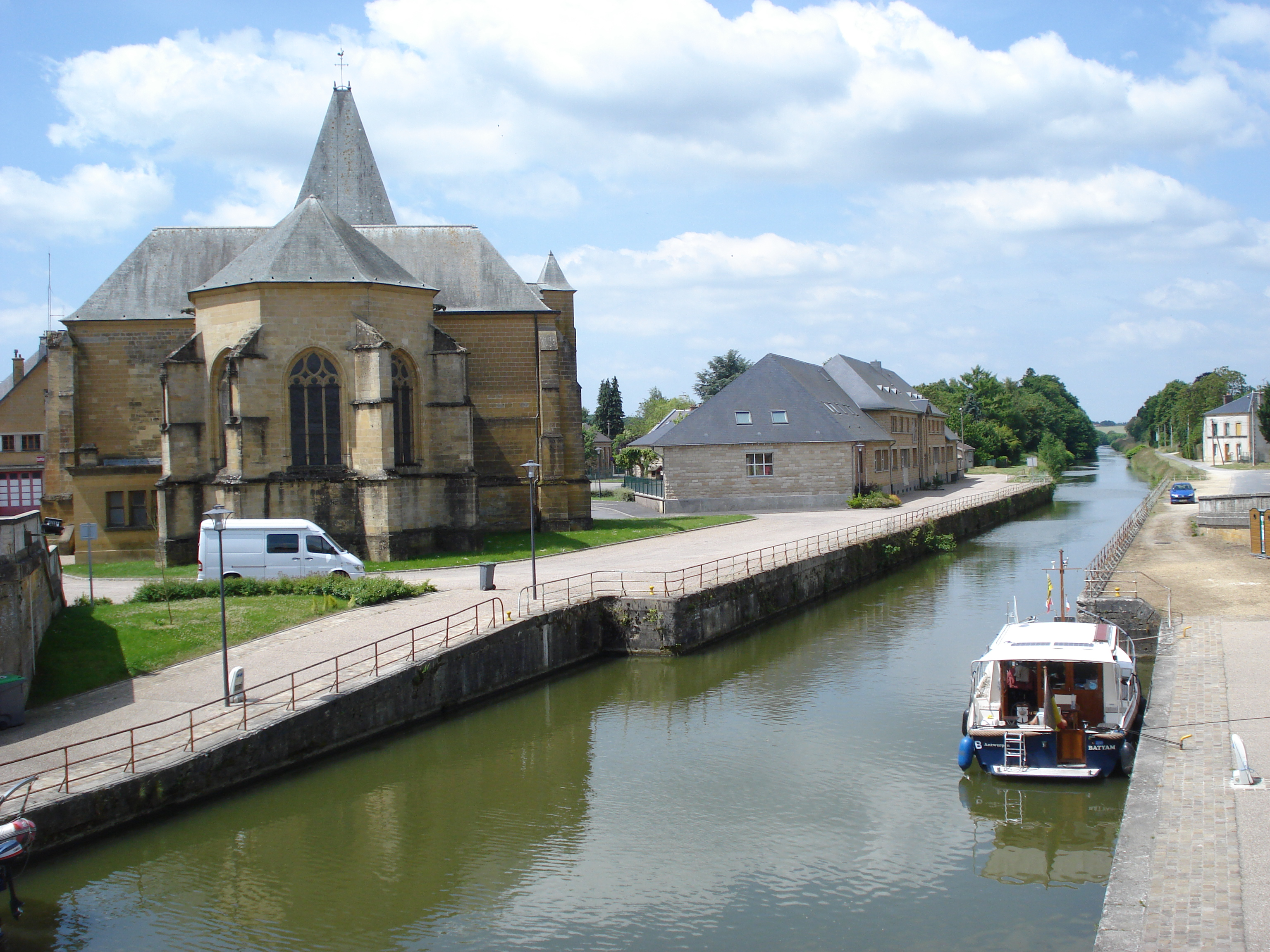 Le Chesne (Ardennes, Fr), church and Canal des Ardennes